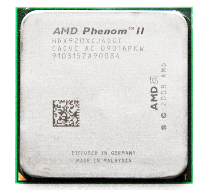 AMD Phenom II X4 920 Socket AM2+